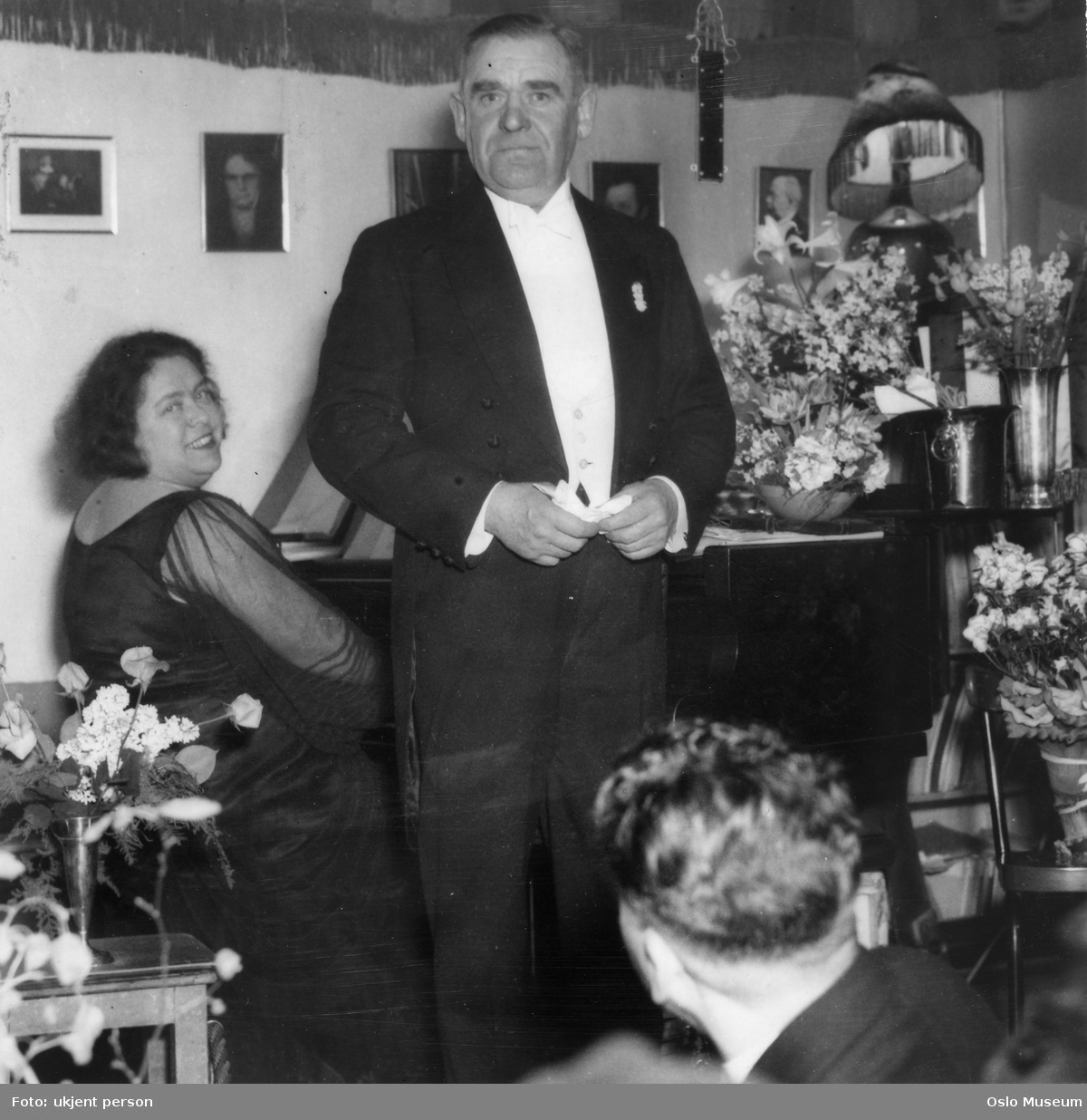 Bilde av skuespiller og sanger Harald Steen